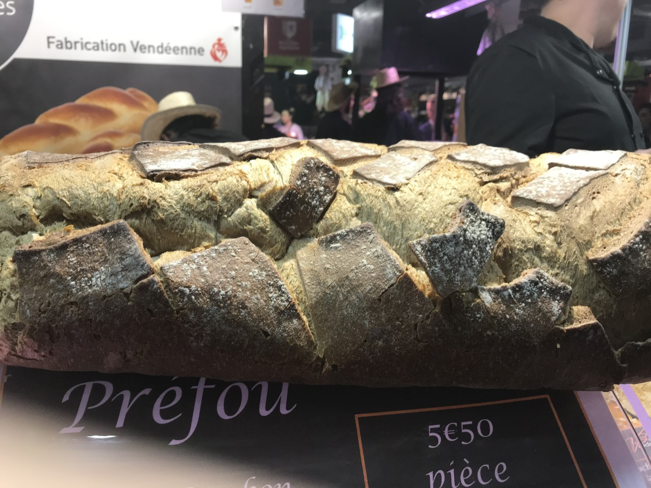 Pain préfou au salon international de l'agriculture 2020.